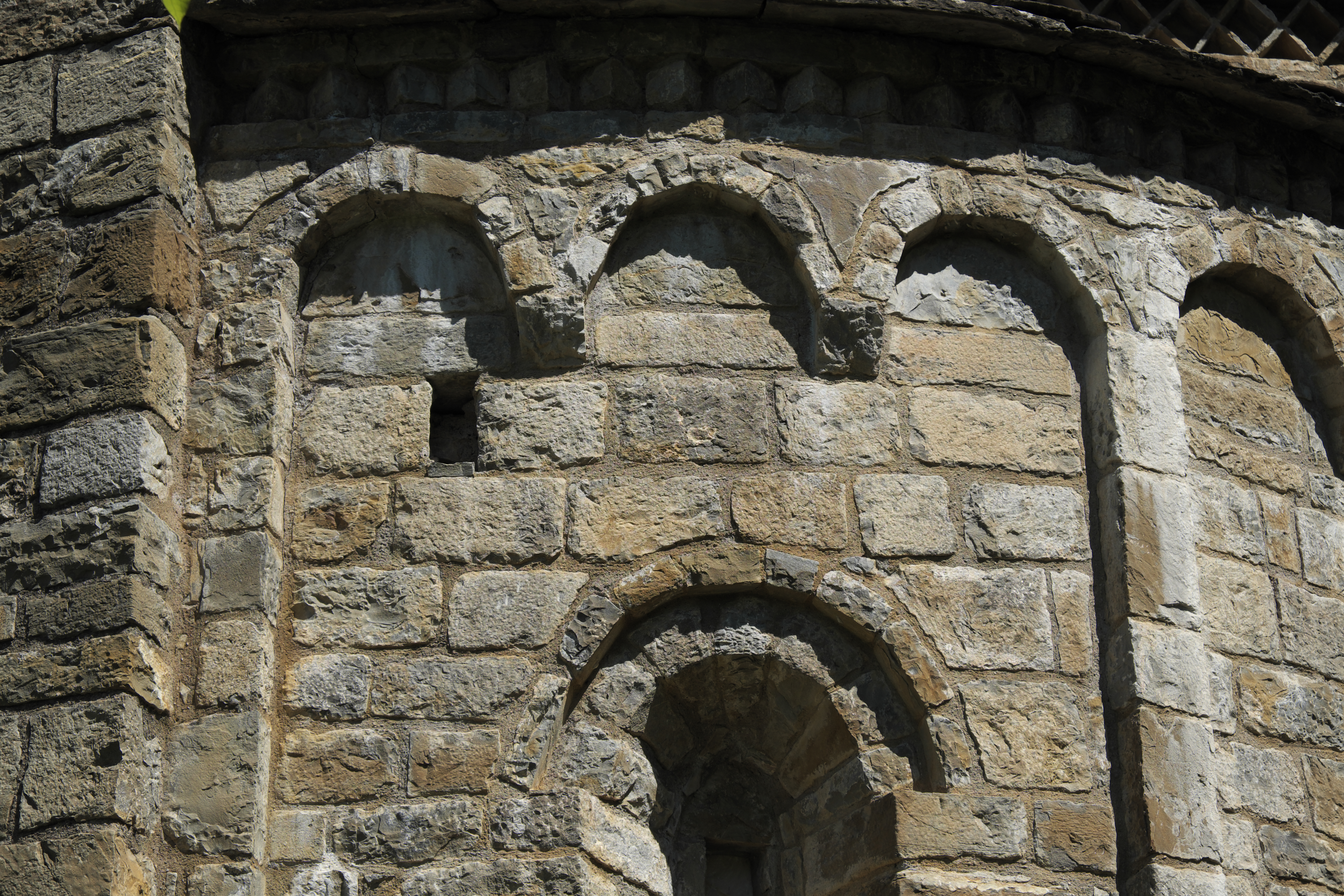 Ehemalige Benediktinerklosterkirche Santa María des Klosters Santa María de Obarra in Beranuy in der Provinz Huesca (Aragón/Spanien), Apsis mit Blendarkaden